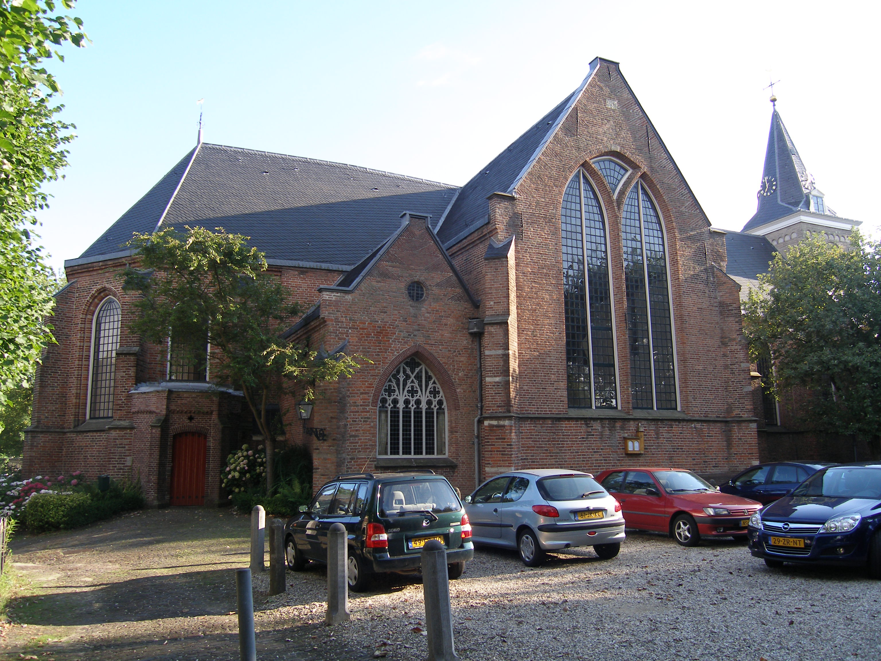 project rijksmonumenten Maarssen